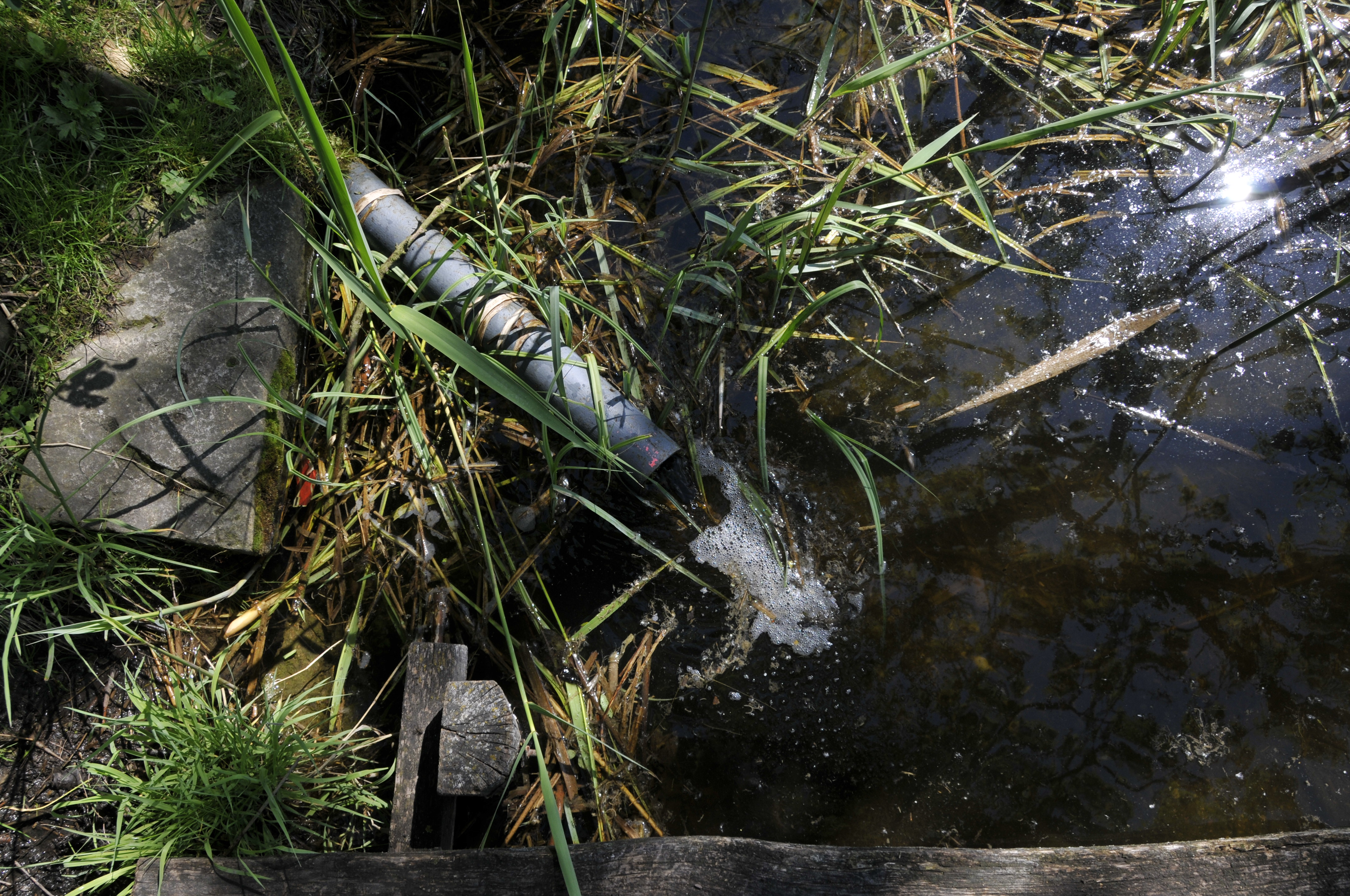 Einlauf aus der Geierslache in den Siebleber Teich